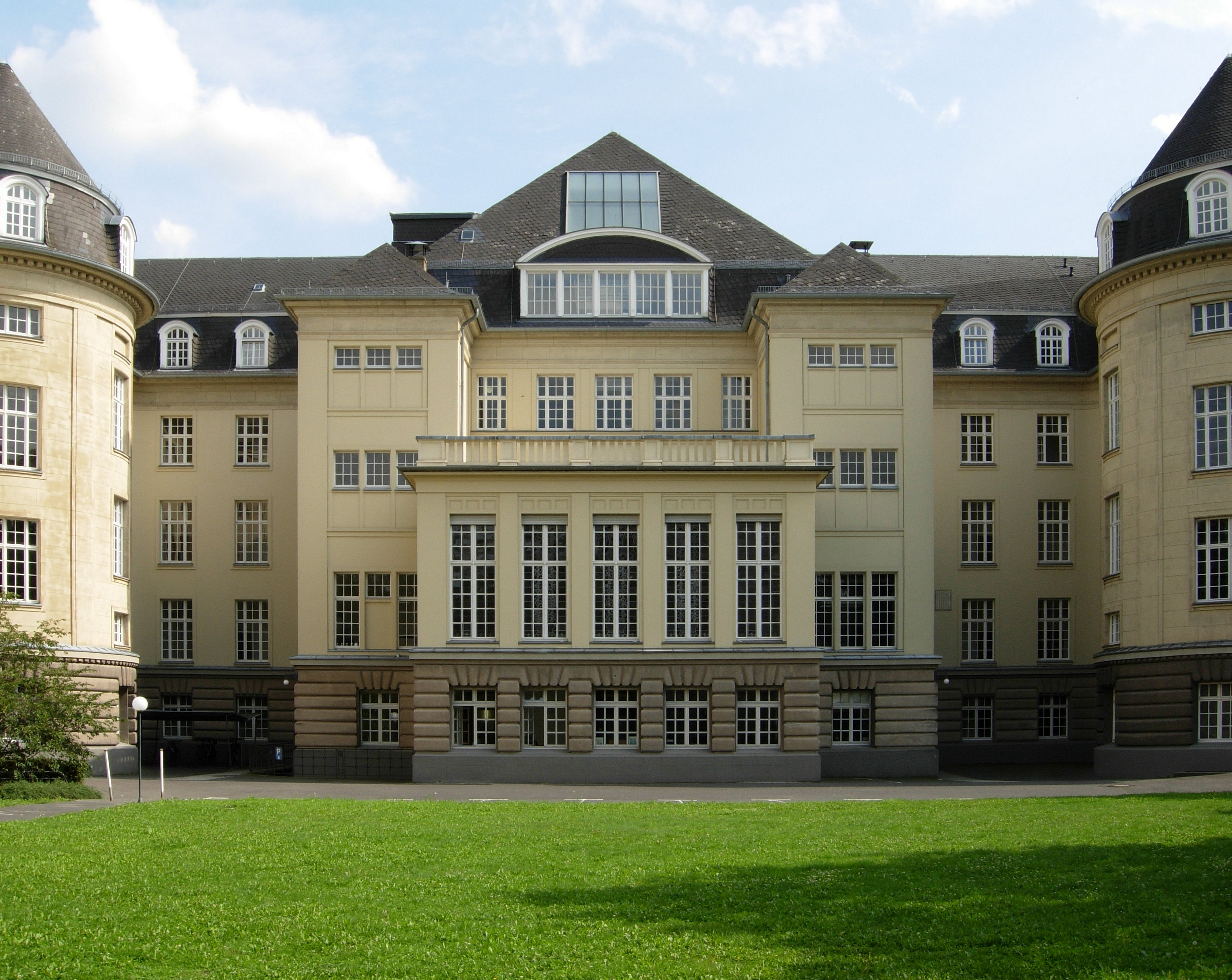 Hofansicht des Gebäudes der ehemaligen Landwirtschaftskammer Rheinland an der Endenicher Allee in Bonn-Weststadt (Architekt: Regierungsbaumeister Heinrich Roettgen, der auch den Erweiterungsbau des Rheinischen Landesmuseums, den heutigen Altbau an der Bachstraße, entworfen und ausgeführt hat); das Bauwerk beherbergt seit Juli 2009 das Mathematik-Zentrum der Universität Bonn